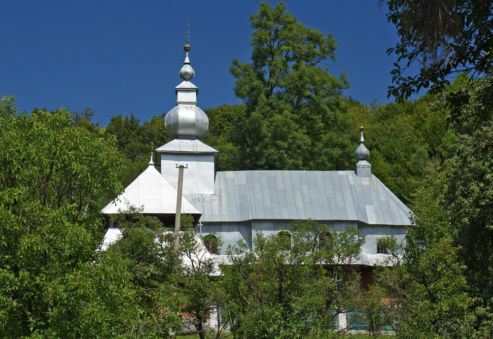 Святодухівська церква (дер.), Котельниця Фото: ВздовжКарпатська Експедиція, 27.07-28.08.2013